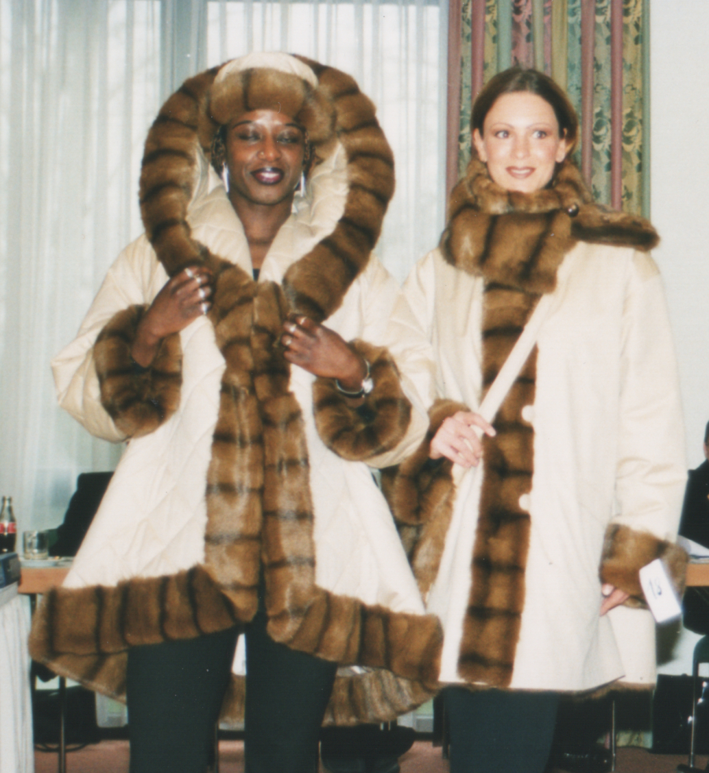 Zwei Stoffjacken, verbrämt mit Kolinskyfell; Kolinskymütze- und tasche. Vorgeführt 1999 auf einer Arbeitstagung der Vereinigung Initiative Pelzgestaltung V.I.P. im Golfhotel, Krefeld-Traar. Entwurf und Realisation: Kürschnermeister Eduard Tröndle, Darmstadt.